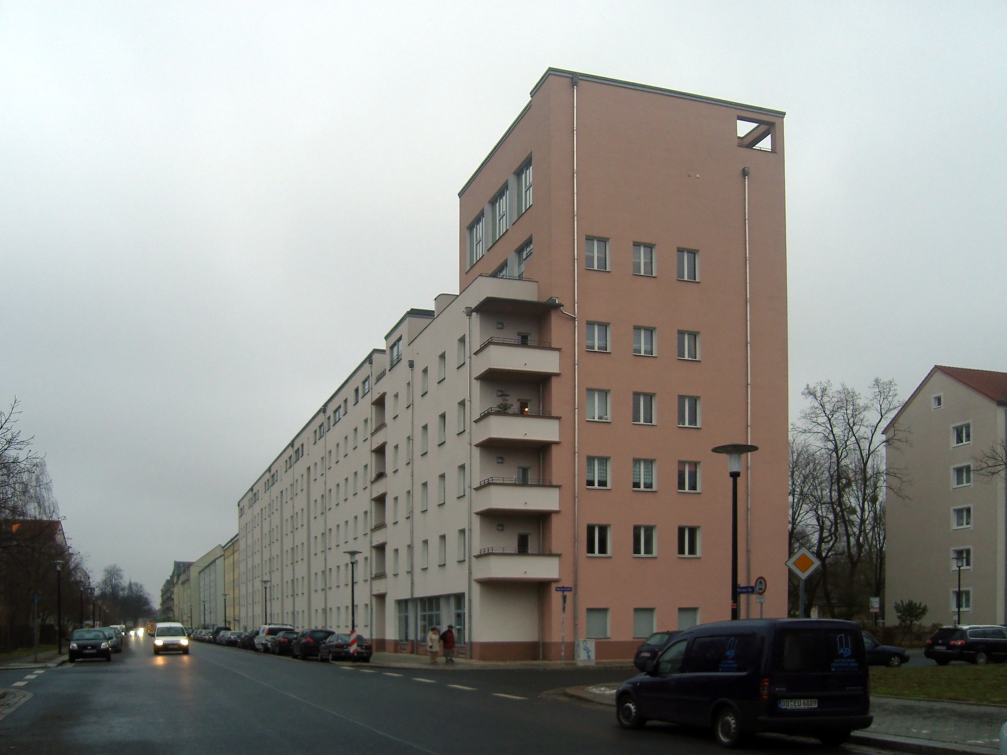 Denkmalgeschütztes Mehrfamilienwohnhaus Spenerstraße 25, 25b/Wormser Straße 42–48 im Dresdner Stadtteil Striesen